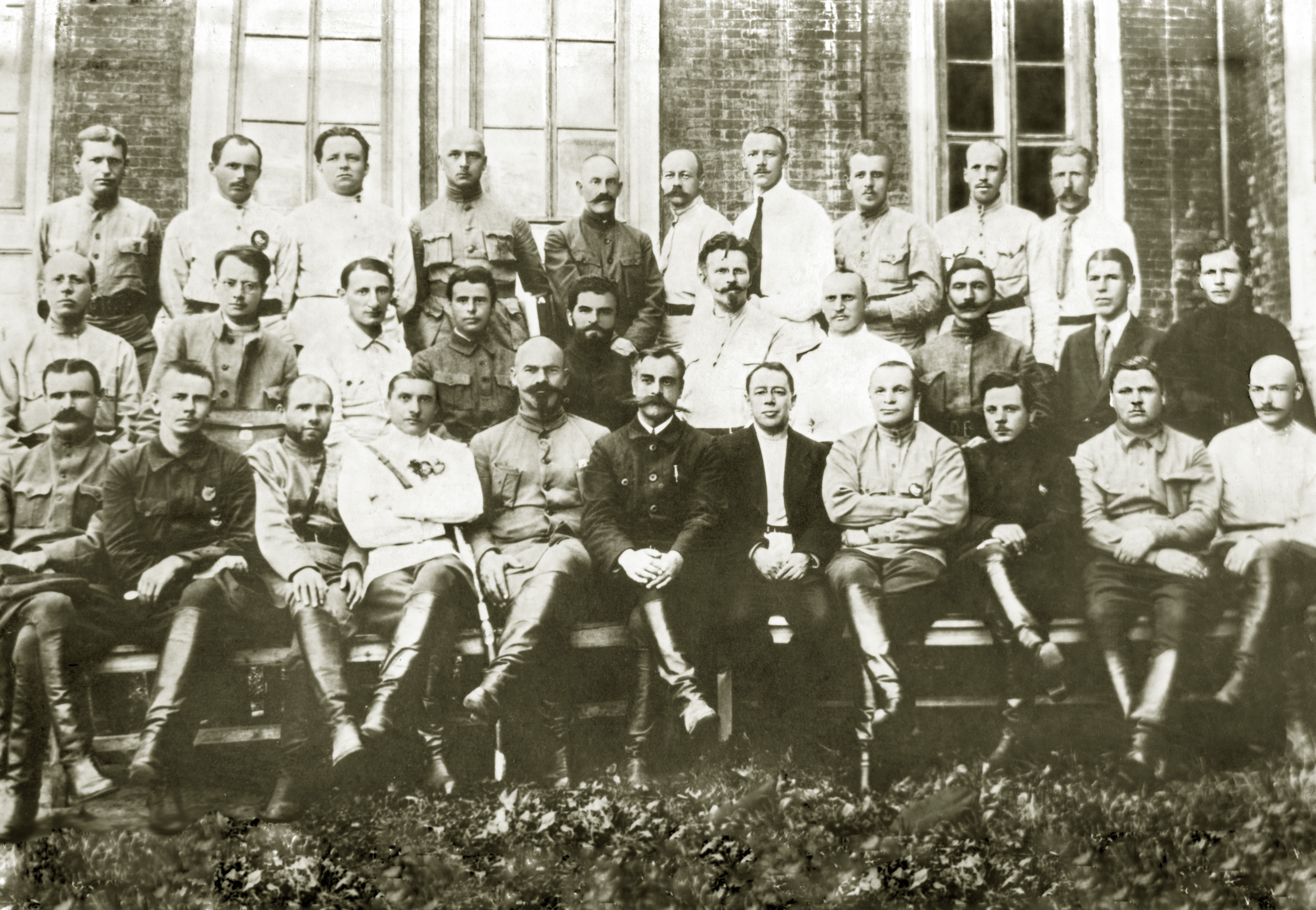 Участники совещания командующих войсками РККА 13 августа 1921 года (слева направо). Верхний ряд: 3-й Ромуальд Адамович Муклевич, 4-й Иоаким Иоакимович Вацетис, 5-й Николай Владимирович Сологуб, 6-й Вильгельм Евгеньевич Гарф, 7-й Владимир Львович Барановский. Средний ряд: 2-й Владимир Александрович Антонов-Авсеенко (по др. св. Иероним Петрович Уборевич), 4-й Иона Эммануилович Якир, 5-й Павел Павлович Лебедев, 7-й Николай Николаевич Петин, 8-й Семён Михайлович Буденый, 9-й Борис Михайлович Шапошников, 10-й Костышев? (по др. св. Павел Петрович Постышев). Нижний ряд: 2-й Август Иванович Корк, 4-й Владимир Соломонович Лазаревич, 5-й Николай Иванович Муралов, 6-й Сергей Сергеевич Каменев, 7-й Сергей Иванович Гусев, 8-й Александр Ильич Егоров, 9-й Климент Ефремович Ворошилов, 10-й Дмитрий Прокофьевич Оськин